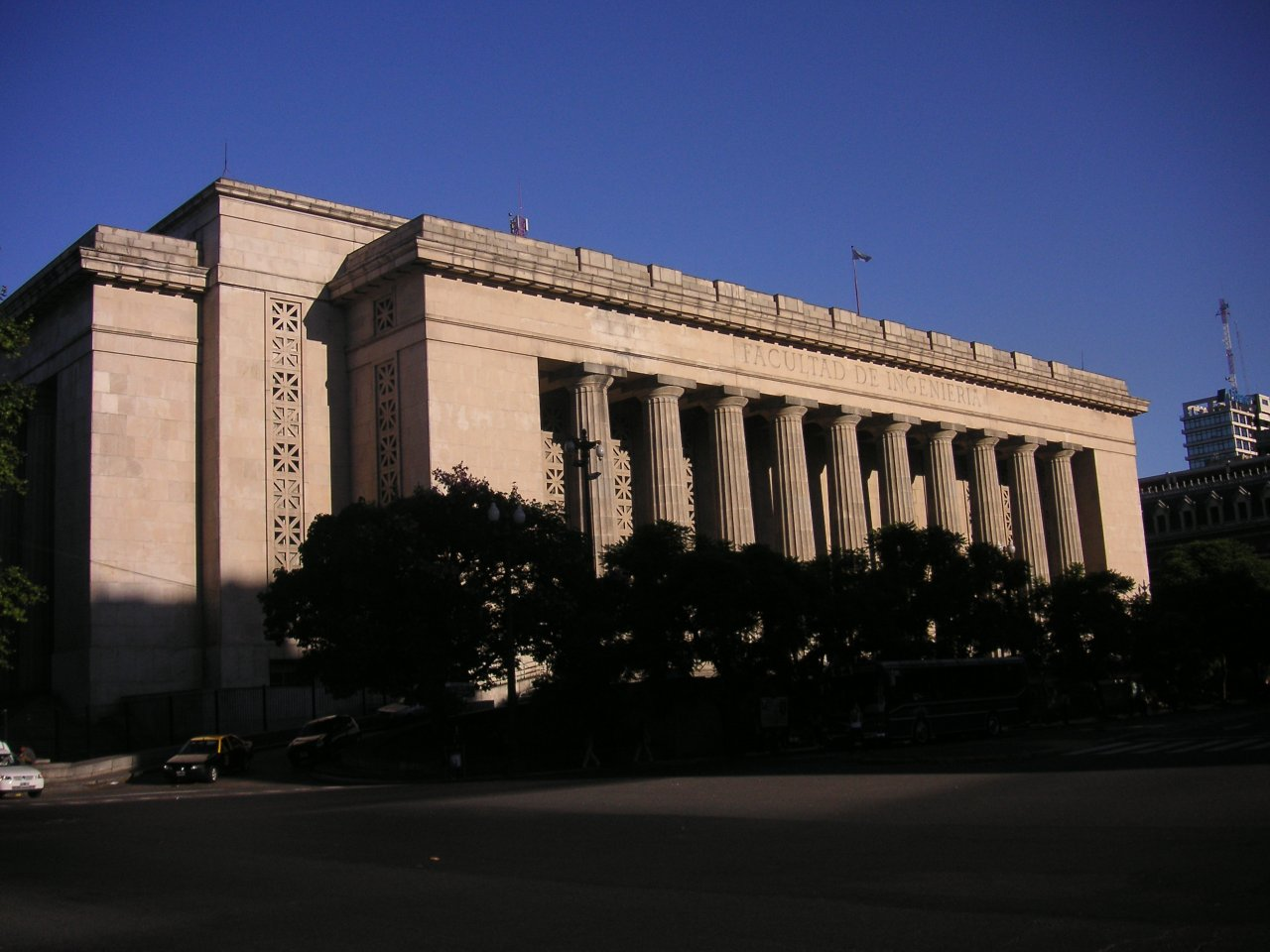 Fachada de la sede Paseo Colón de la Facultad de Ingeniería de la Universidad de Buenos AiresEngineering School